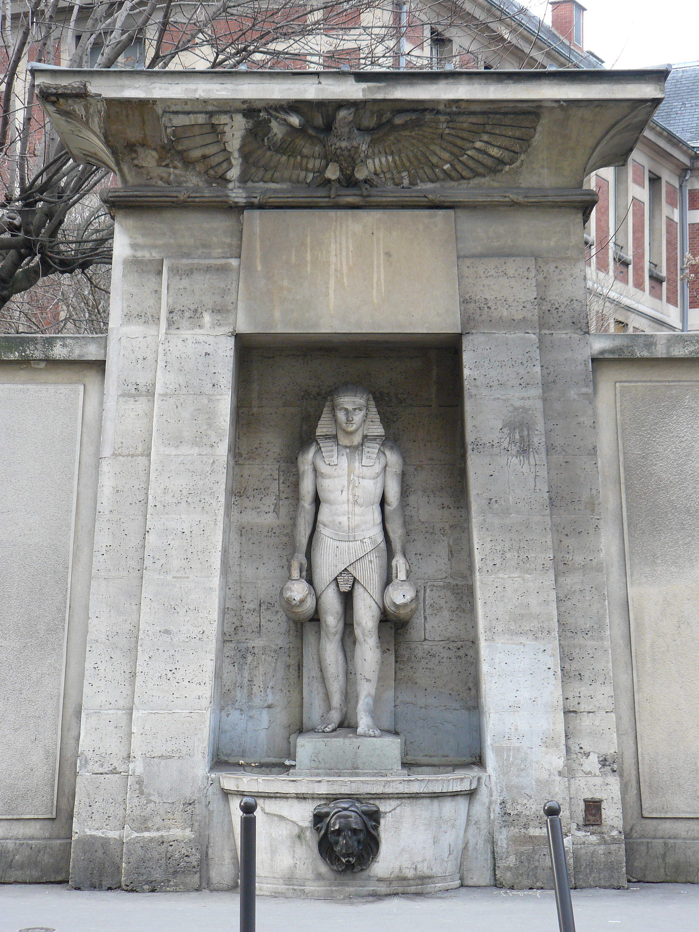 Fontaine du Fellah, située au 42, rue de Sèvres dans le 7e arrondissement de Paris. Construite en 1806. La statue représenterait Antinoüs.